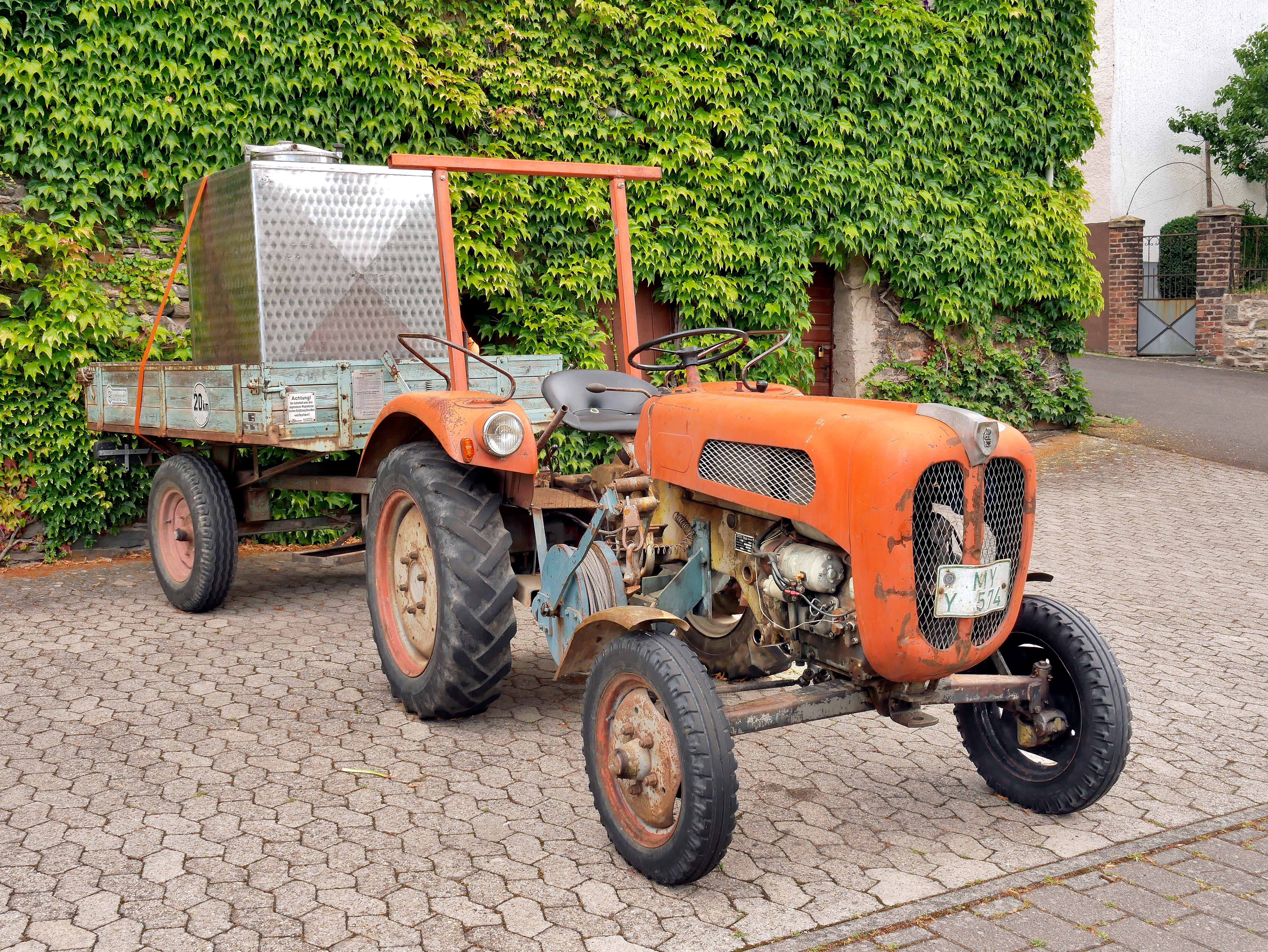 Bautz 200 D, Baujahr 1960.